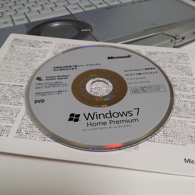 Windows 7 Service Pack 1 日文64位元家用進階版DVD-ROM。